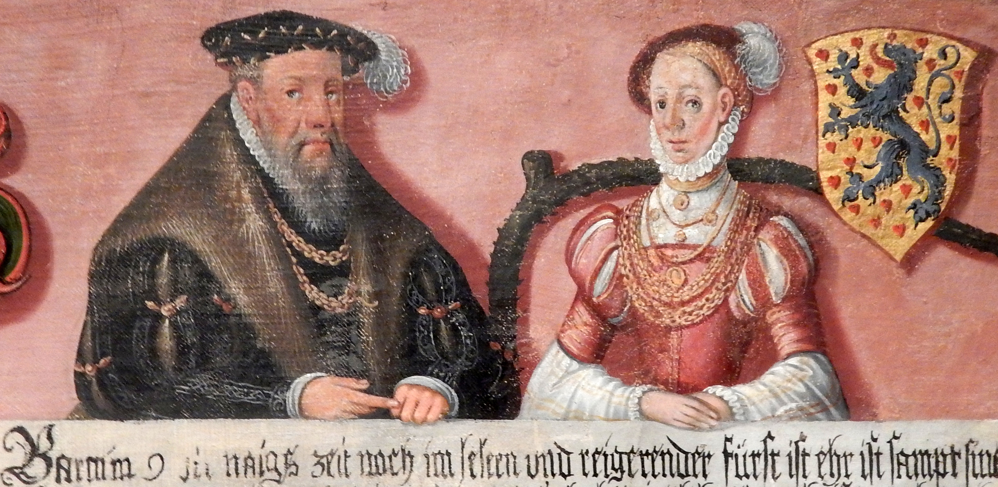 Barnim IX. von Pommern mit seiner Gemahlin Anna von Braunschweig-Lüneburg.